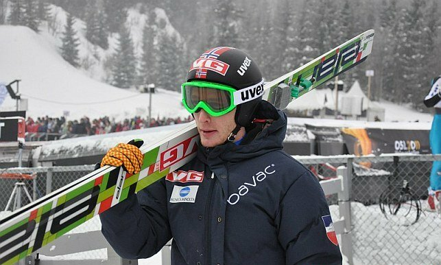 Johan Remen Evensen podczas serii kwalifikacyjnej przed konkursem indywidualnym mężczyzn na skoczni normalnej na Mistrzostwach Świata w Narciarstwie Klasycznym 2011 w Oslo.